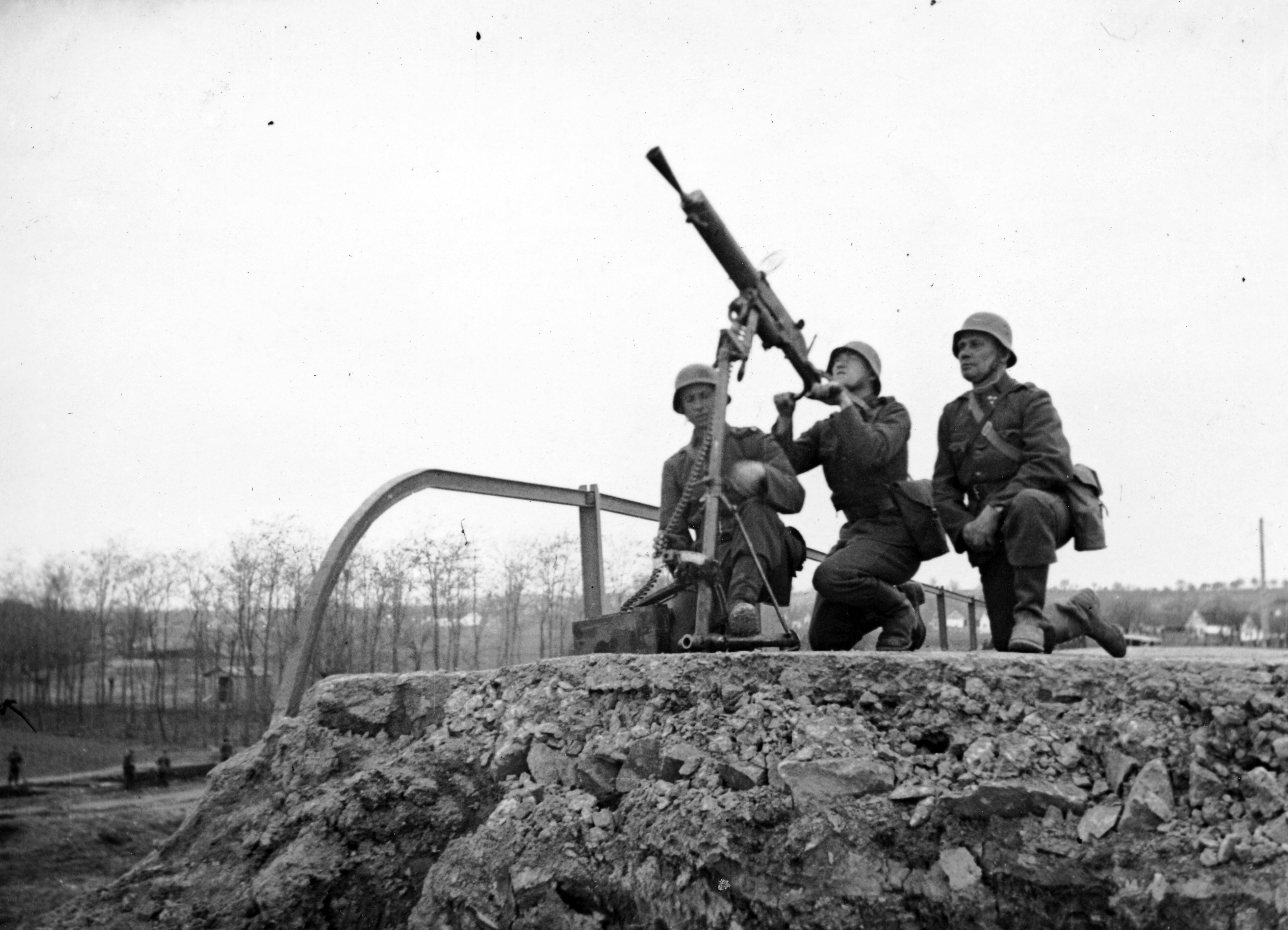 Légvédelemre beállított Schwarzlose MG.07/12 géppuska.Serbia? Vojvodina?? Title: Légvédelemre beállított Schwarzlose MG.07/12 géppuska.